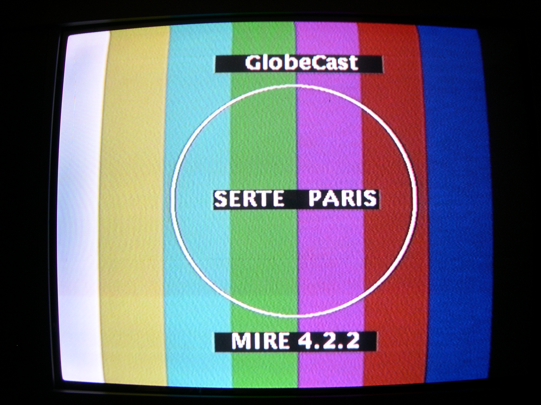 Mire satellite test Globcast (France Télécom) DVB-S 4.2.2 Mire via transmetteur 2.4 Ghz. En observant attentivement on remarque que l'image est bruitée ( granuleuse)